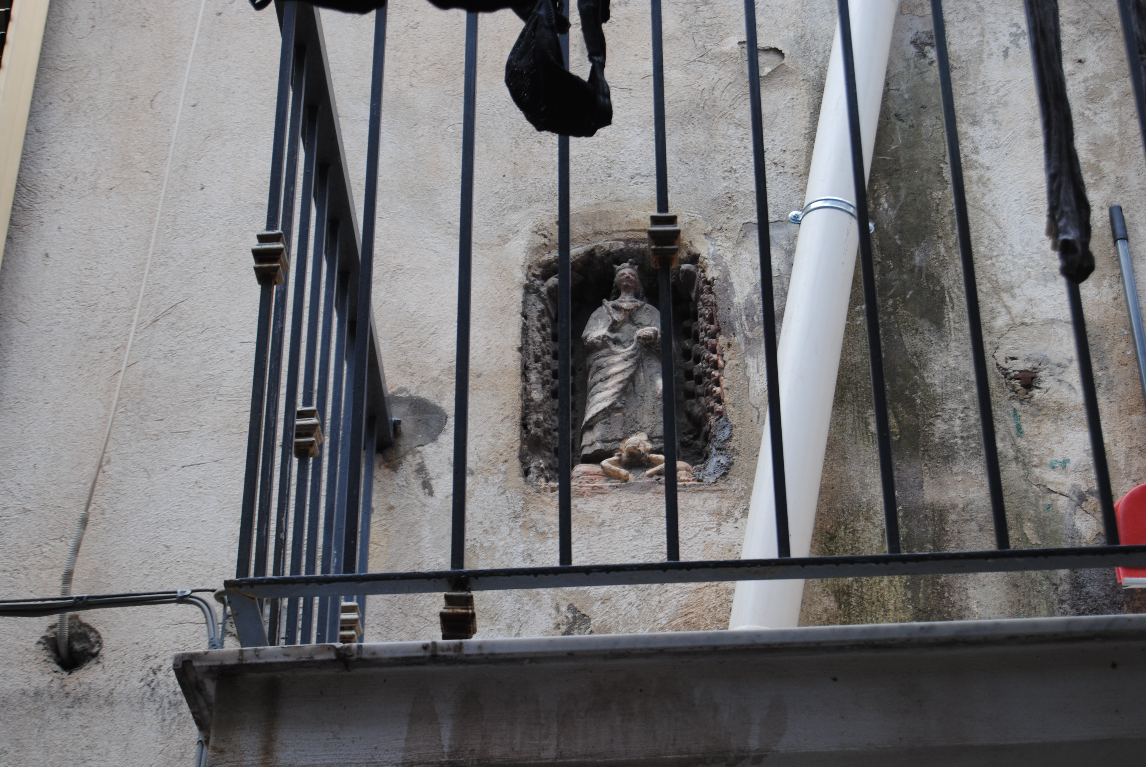 Icona rappresentante forse Sant'Agata, mentre pesta una figura maschile (Federico II?), ubicata in vico degli Angeli e soffocata da un balconcino abusivo.